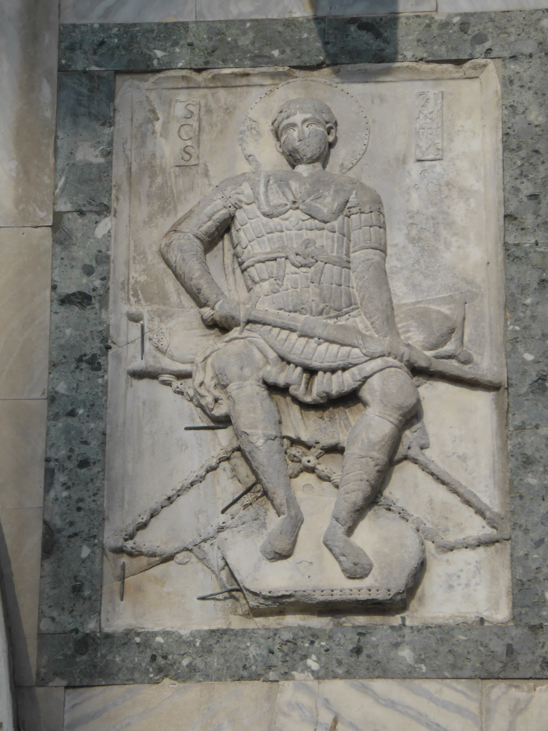 Reliefikone Hl. Demetrios, byzantinische Spolie